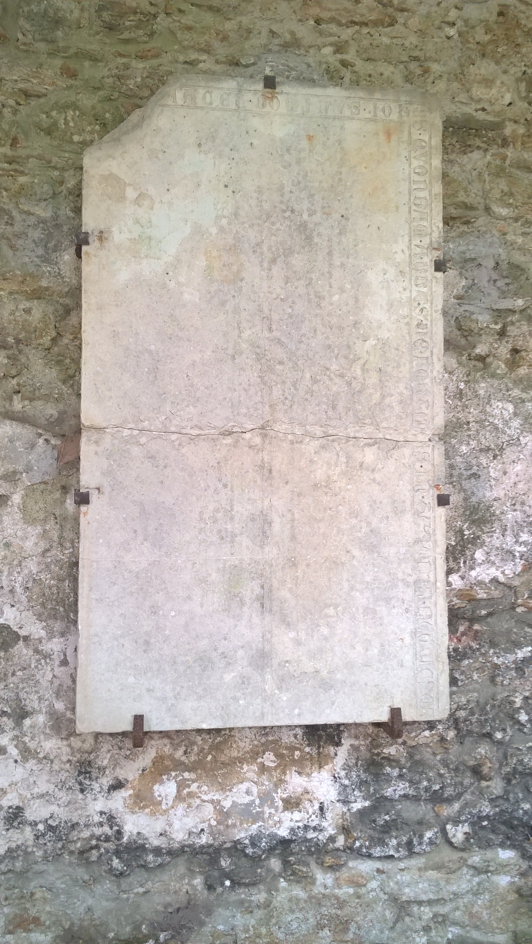 Dalle funéraire abbé église de l'abbaye des Vaux-en-Cernay